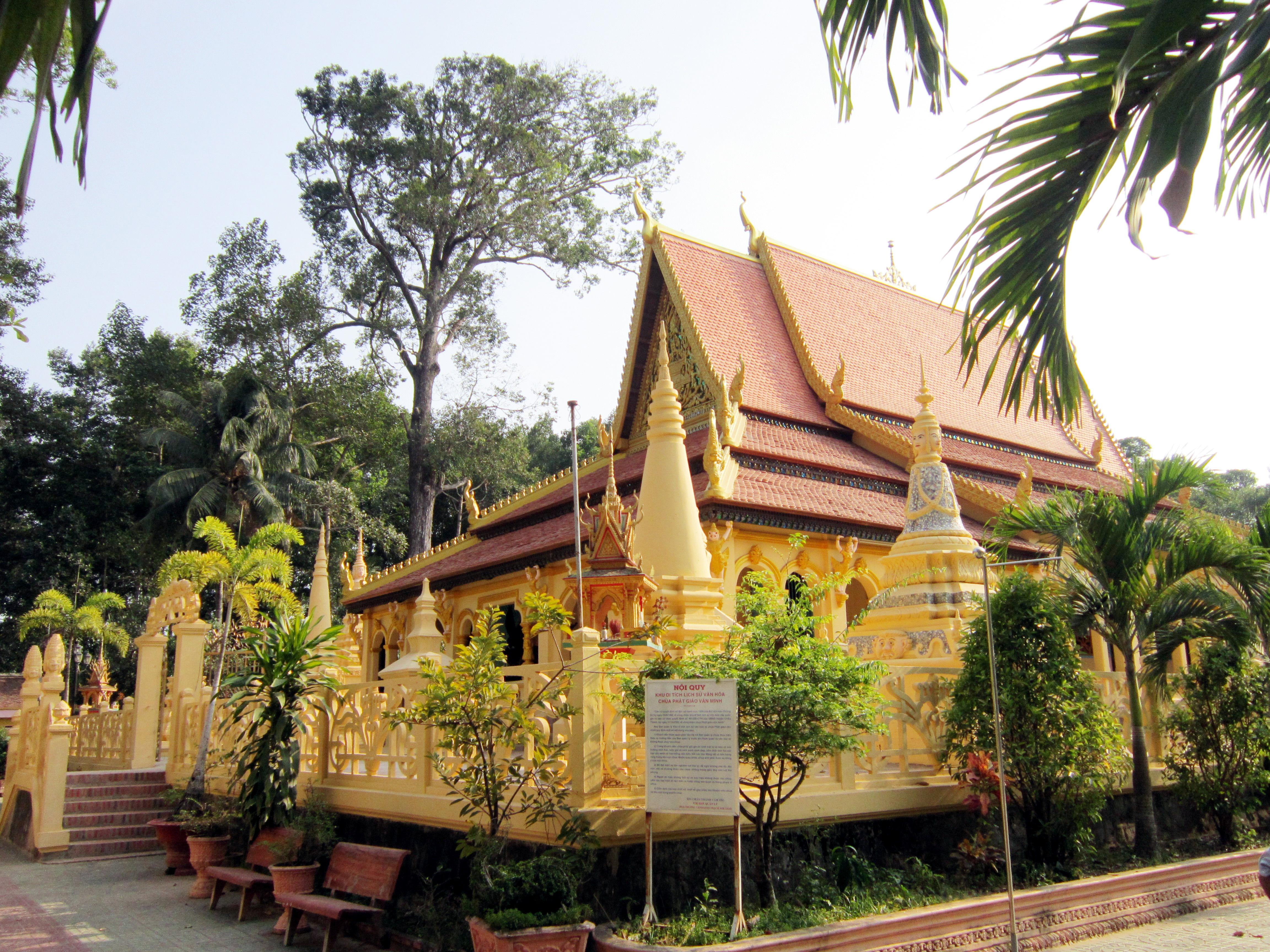 Bên ao Bà Om là chùa Âng (chùa Angkorajaborey). Đây là ngôi chùa Khmer cổ ở Trà Vinh (Việt Nam).